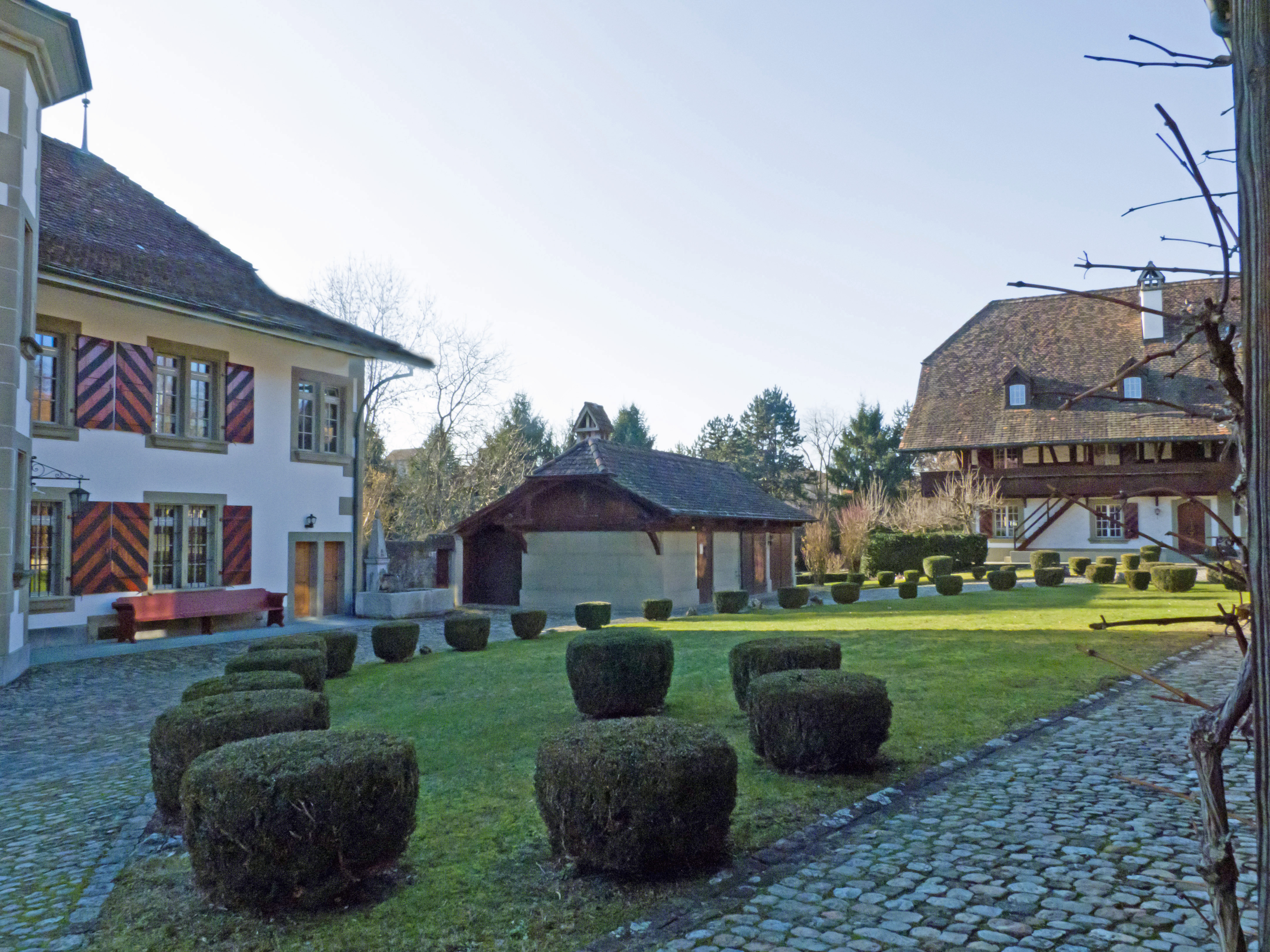 Thalgut, Hof gegen West